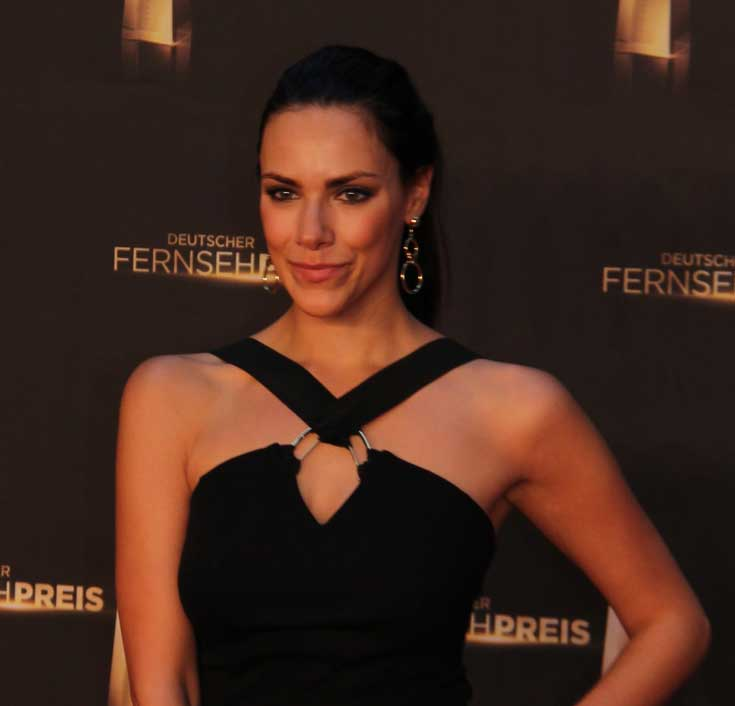 Esther Sedlaczek beim Deutschen Fernsehpreis 2012